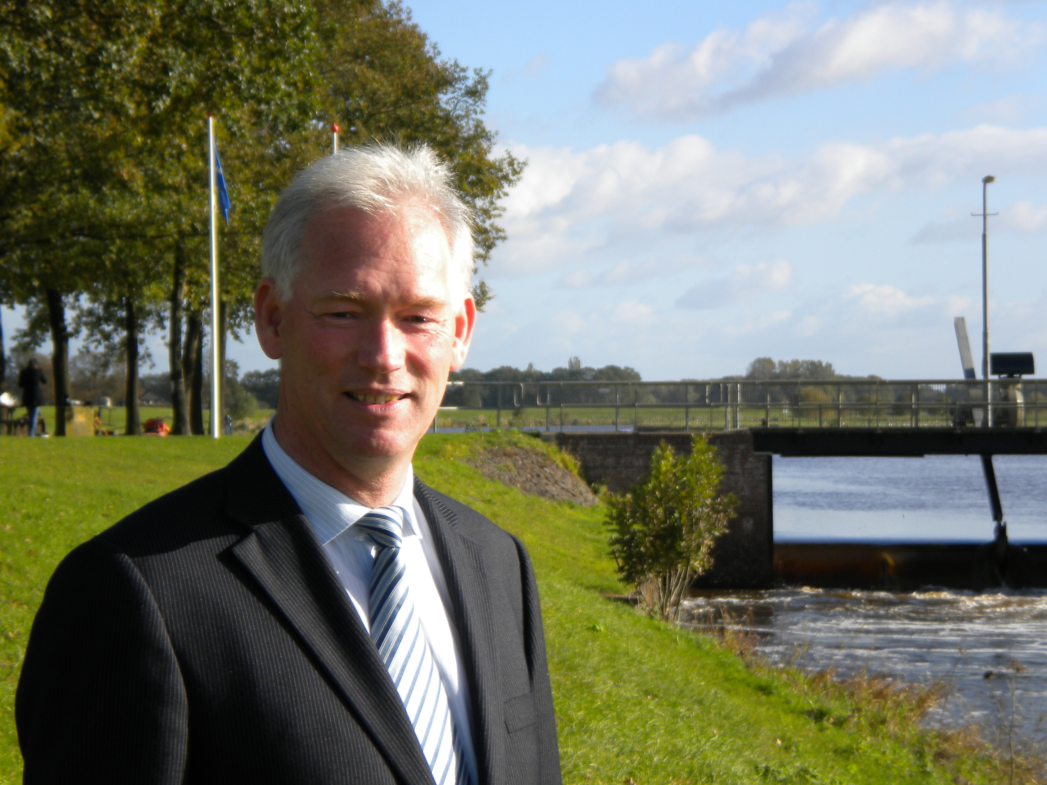 Herman Dijk, dijkgraaf en voorzitter Algemeen Bestuur, Waterschap Groot Salland